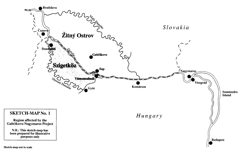 ガブチコボ・ナジュマロシュ計画事件ICJ判決でICJが示した、計画によって影響を受ける地域